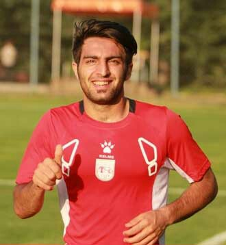 سامان نريمان جهان در تراكتورسازى تبريز